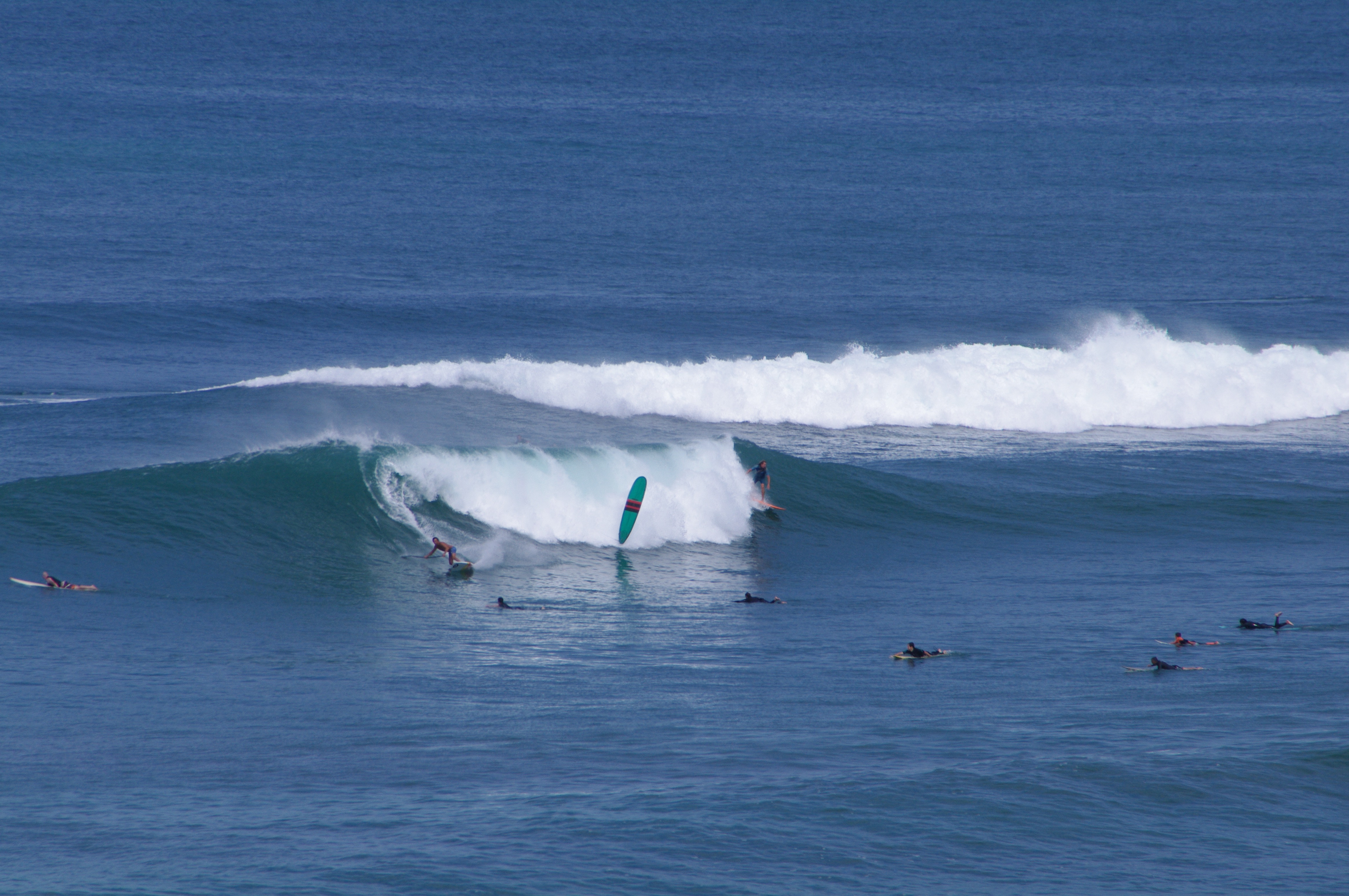 Surf à Guéthary été 2015